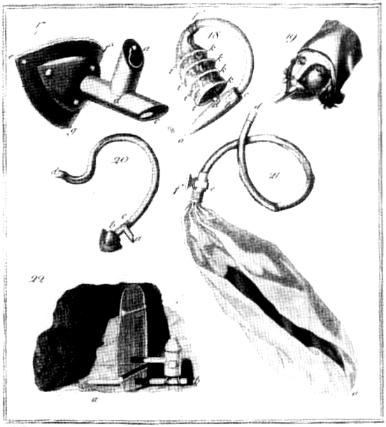 Humboldt's first gasmask